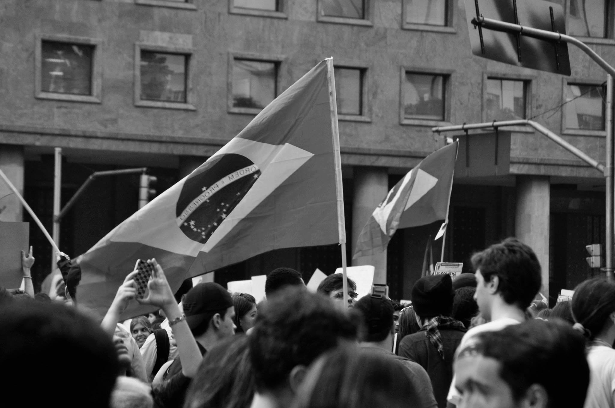 Candelaria